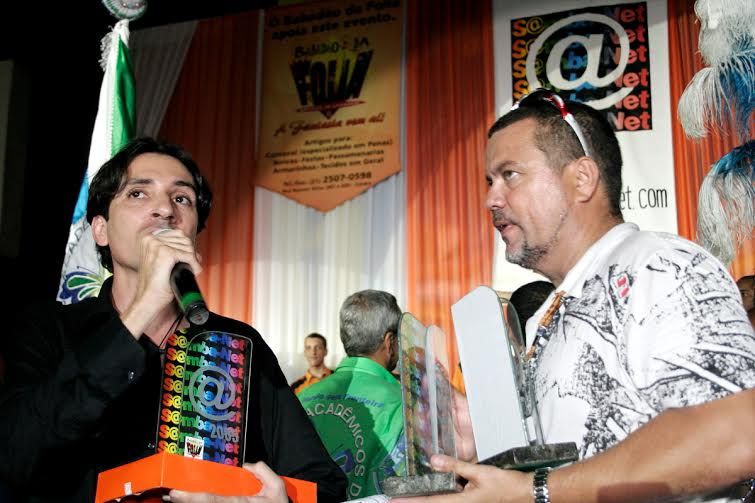 Foto: Mauro Samagaio